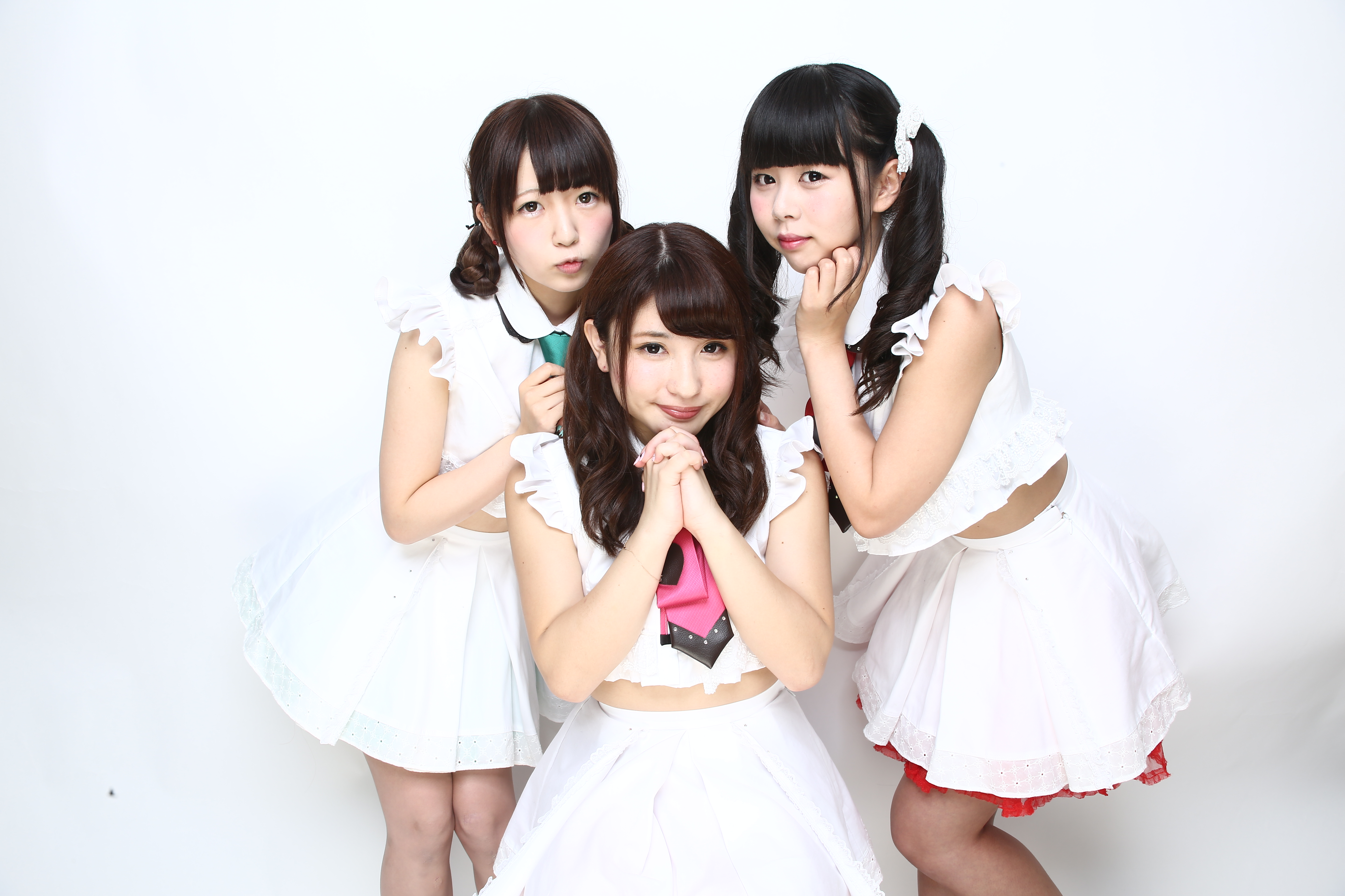 acteveトップ写真